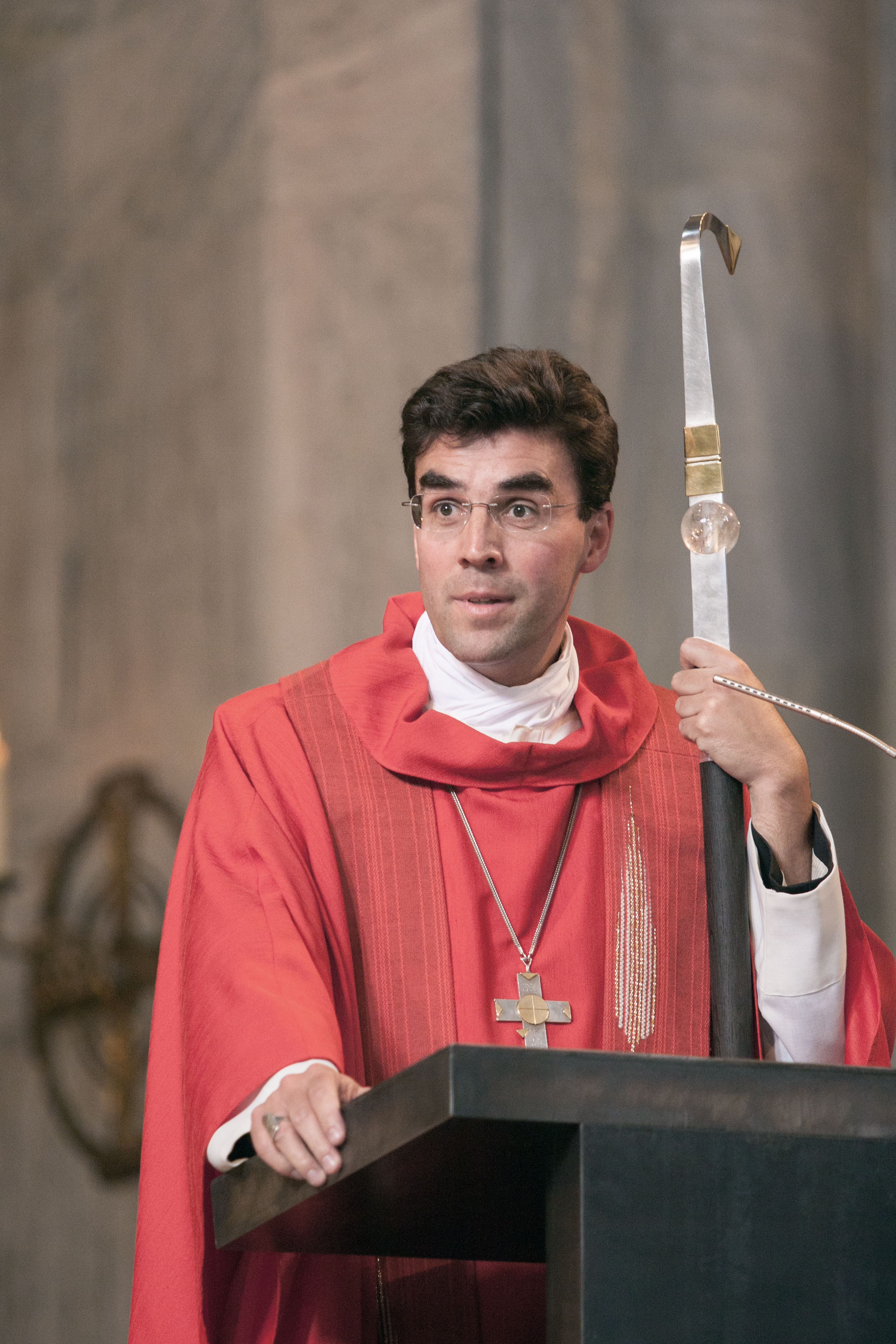 Abt Johannes Eckert (St. Bonifaz, München) während der Firmungsmesse im Juli 2008 in der kath. Pfarrkirche St. Benno, München